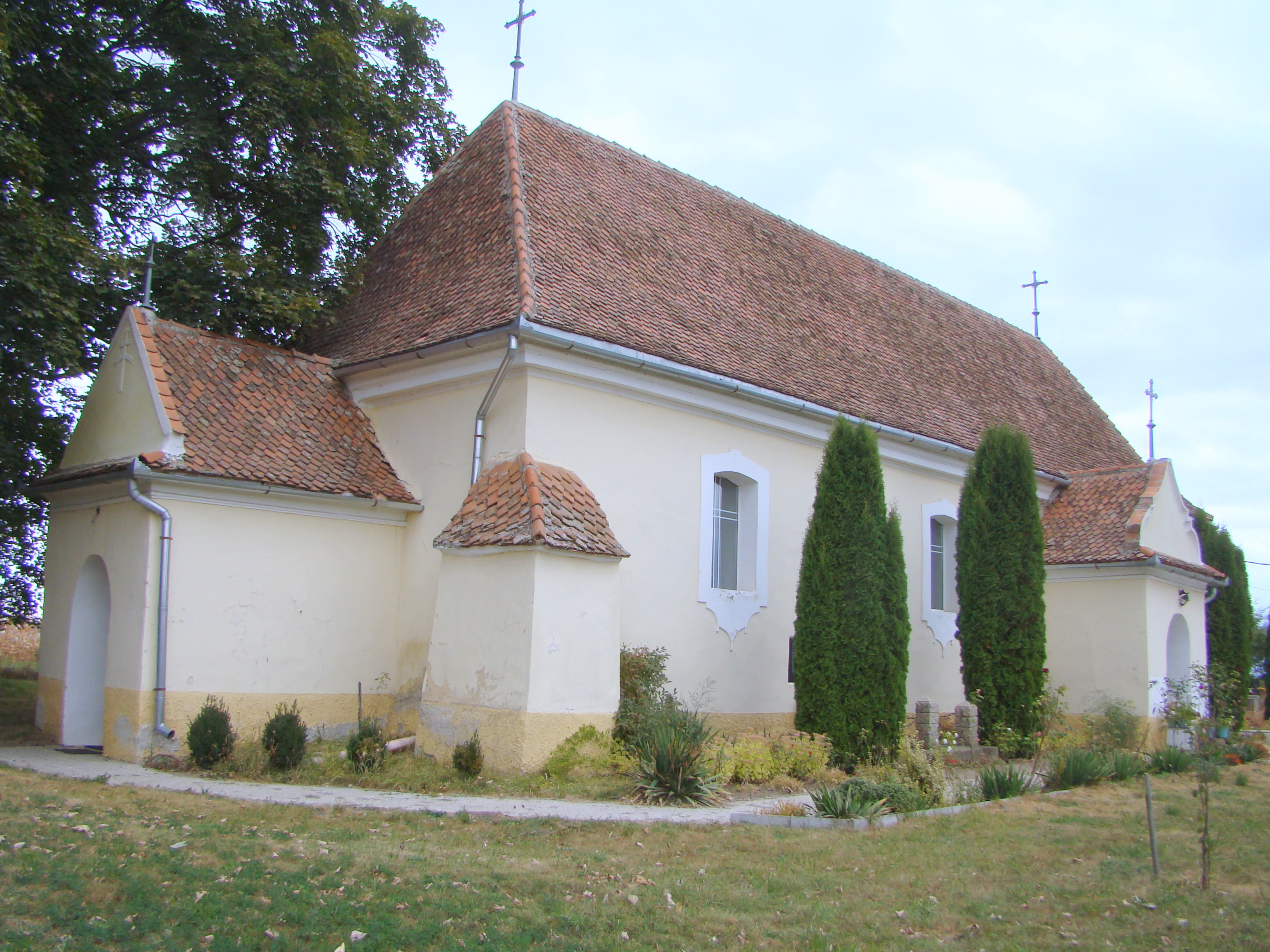 Biserica romano-catolică „A Tuturor Sfinților”, sat Hătuica; comuna Catalina 114 sec. XVI - XIX 01